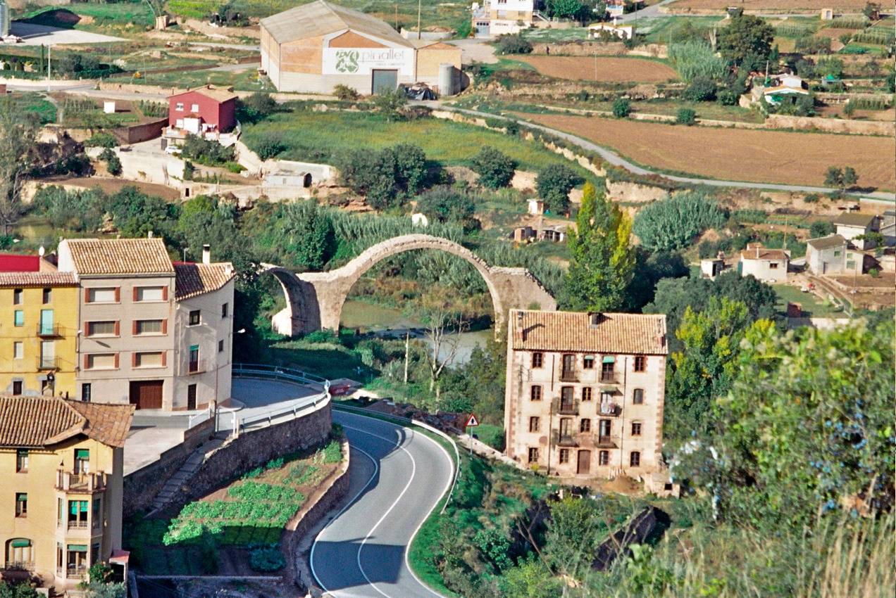 Restes del pont inacabat, dit pont del Diable sobre el Cardener a Cardona.